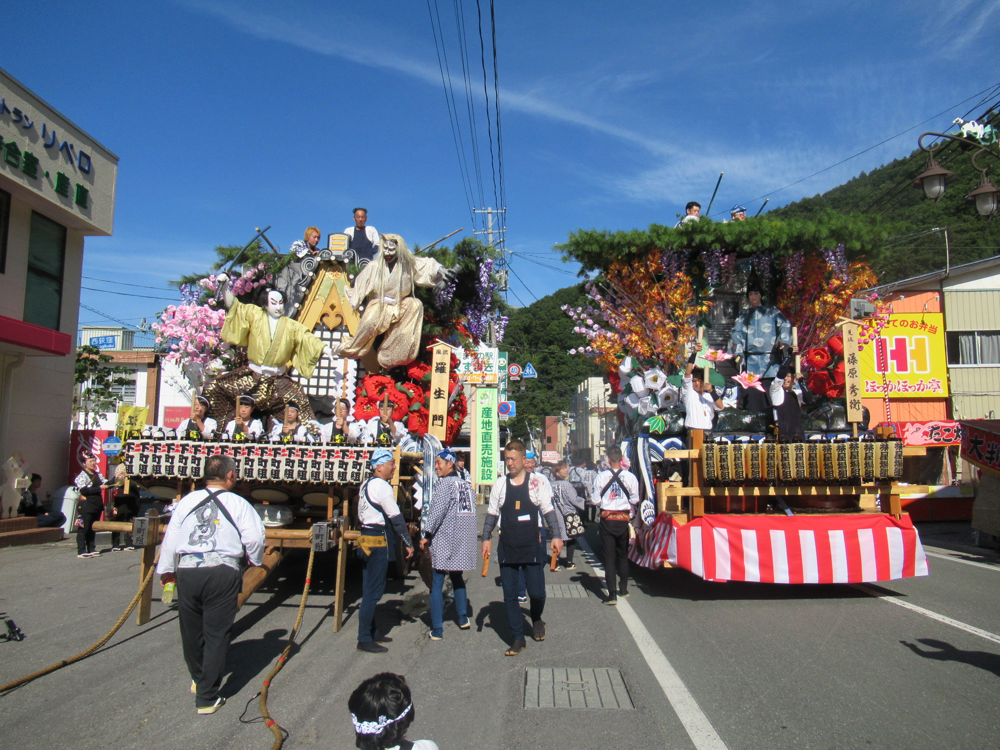 すれ違い